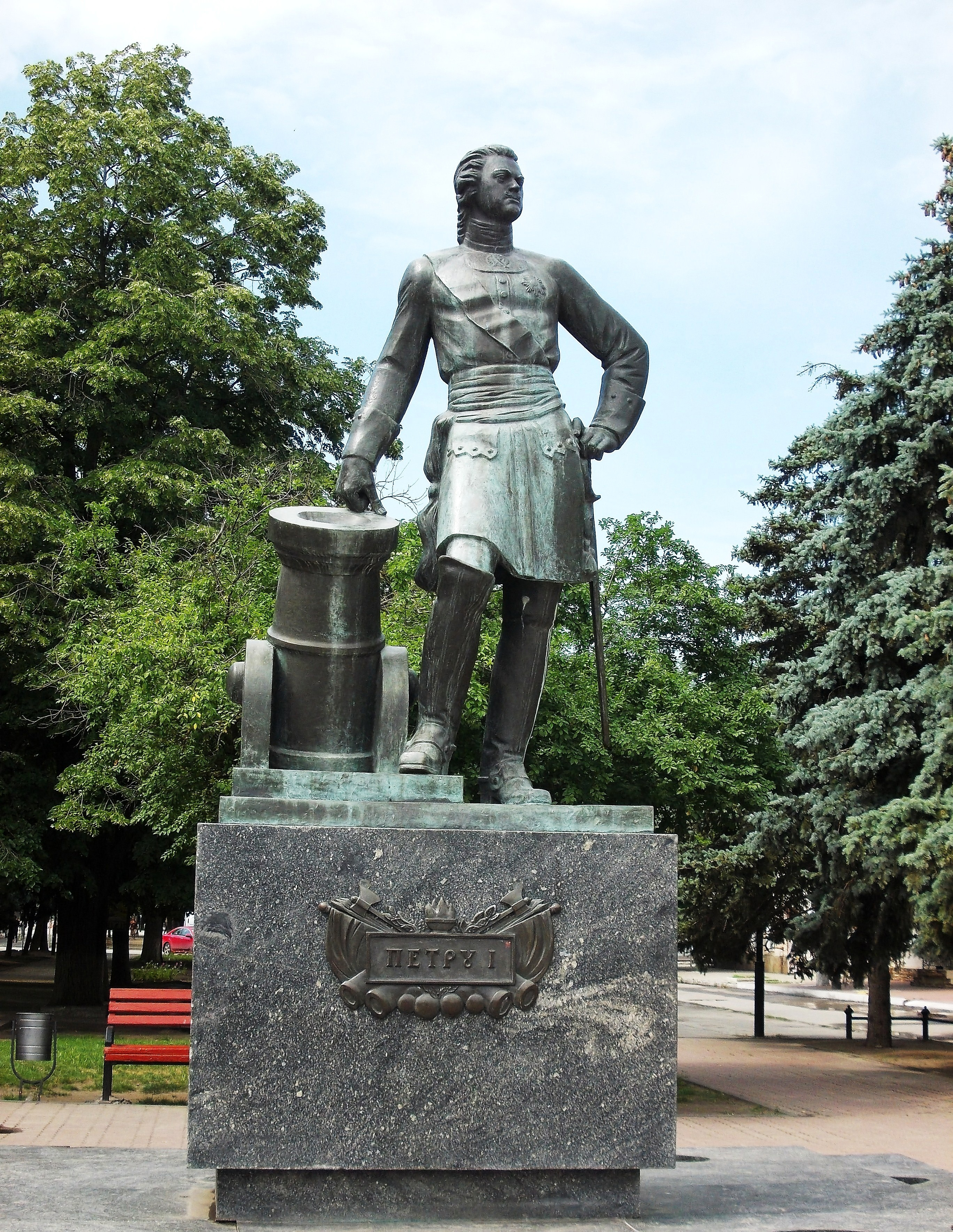 Азов. Памятник Петру I